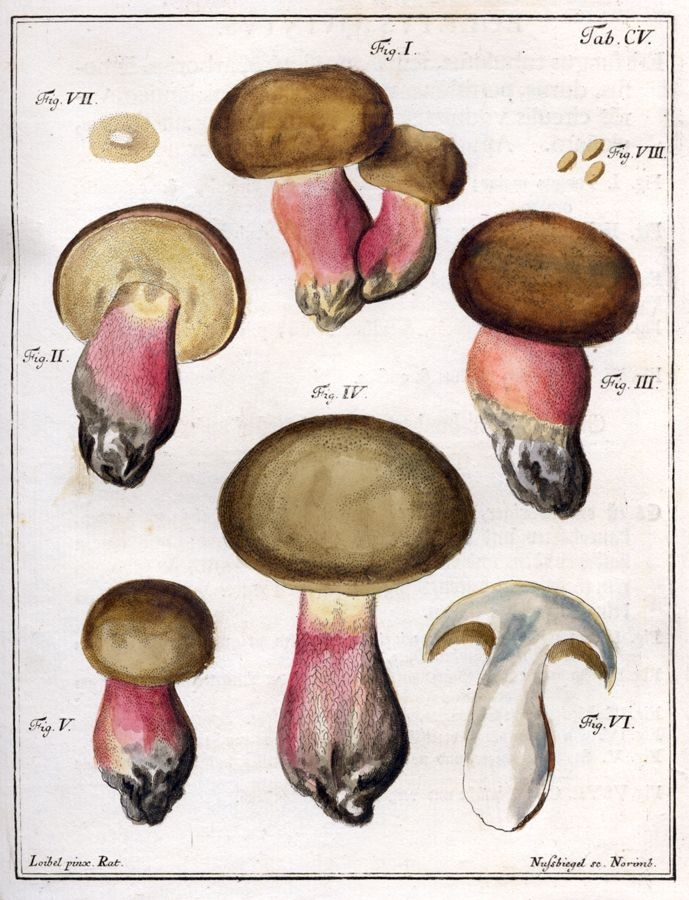 Illustration de Boletus olivaceus, synonyme de Boletus calopus